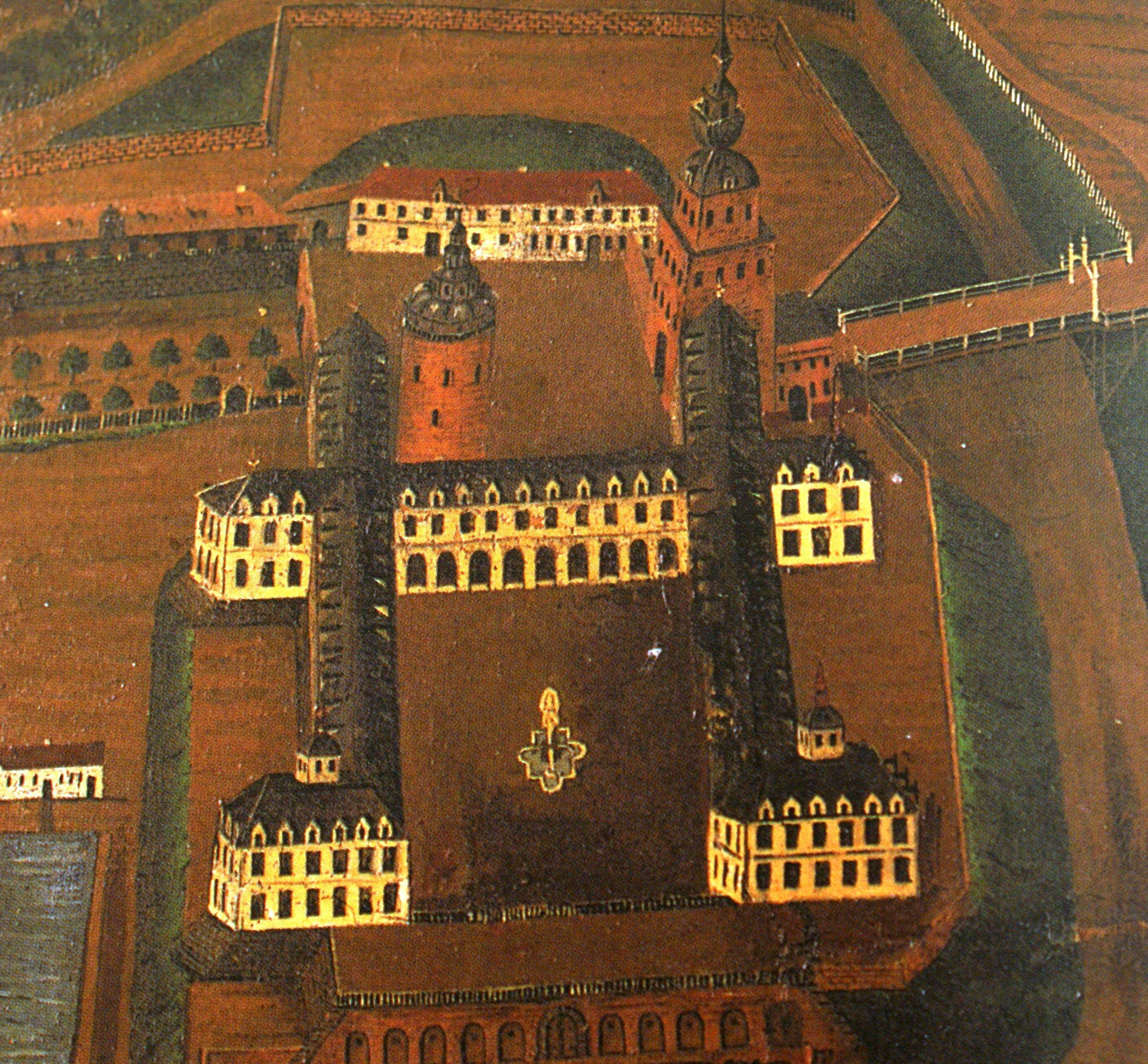 Schloss Lauenburg, Ende des 16. Jahrhunderts